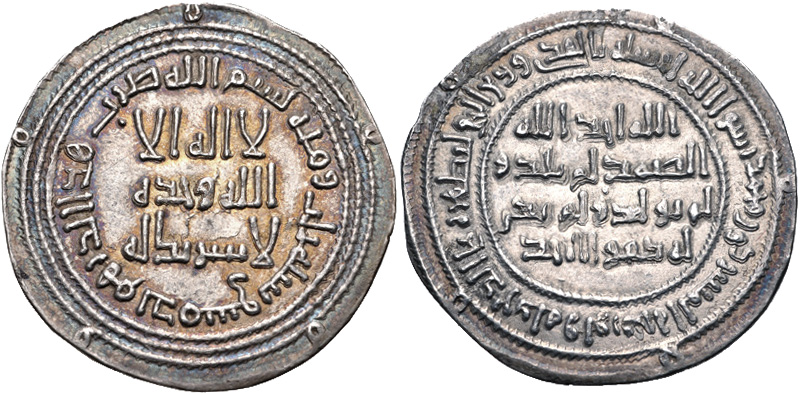 Dirrã do califa omíada Iázide II emitido em 721-722 em Damasco